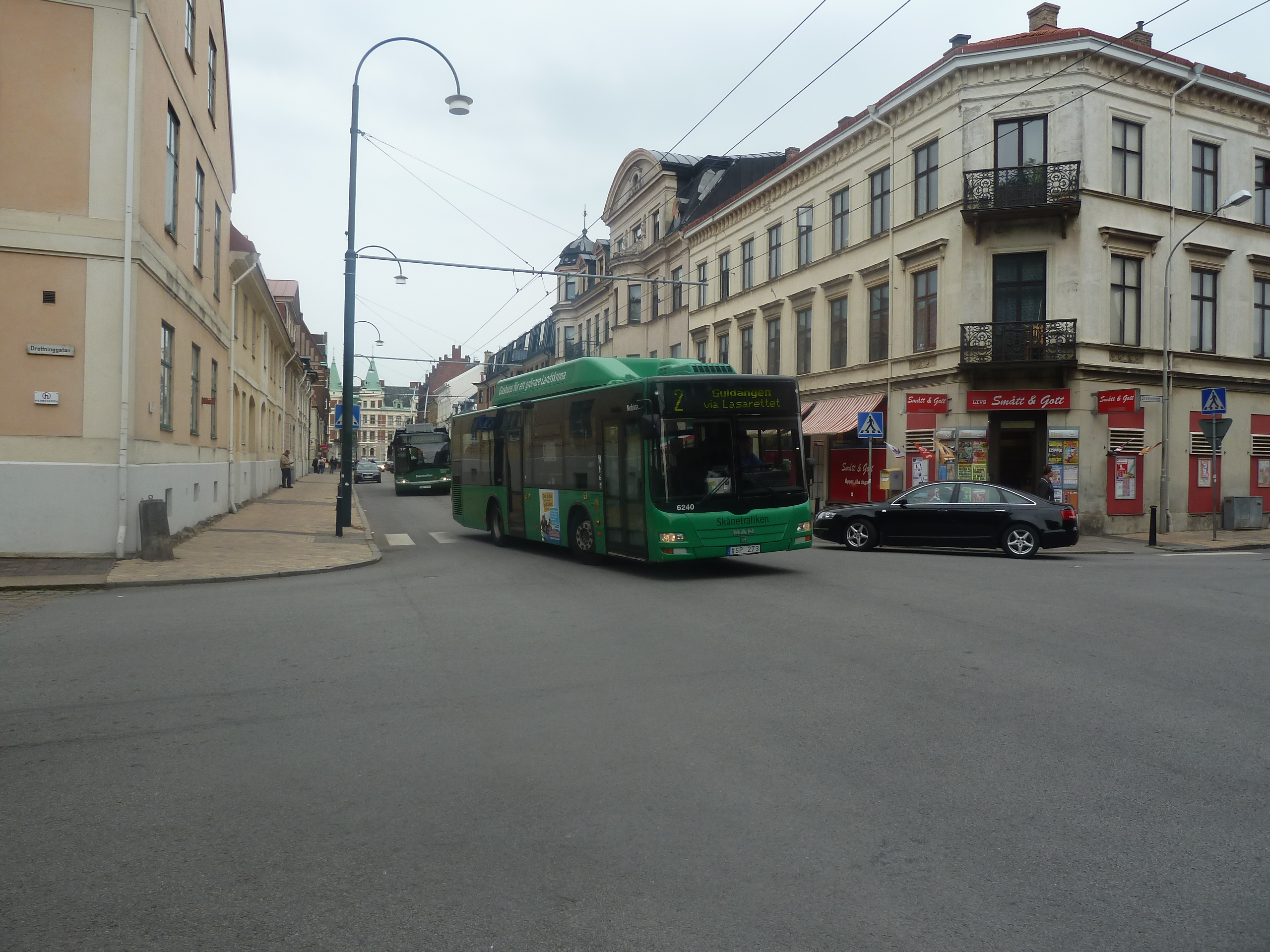 Bus 6240 on line 2 on Storgatan in Landskrona.